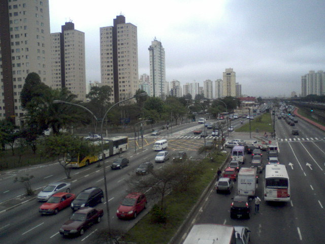 Radial Leste na região do Tatuapé